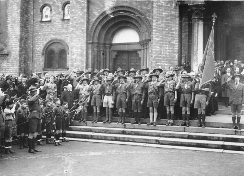 Österreich, Georgstag des ÖPKStG in Wien 8, Uhlplatz, April 1931 Österreich.- Georgstag April 1931 Information added by Wikimedia users.Scouting and Guiding in Austria